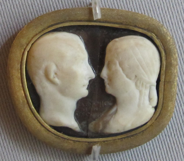 Glittica romana, druso maggiore e antonia, con iscrizione '(gemma) di Alpheos e Arethon', sardonice, I sec dc.